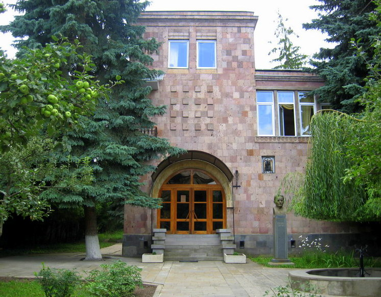 Ստեփան Զորյանի տուն-թանգարան, Վանաձոր 6/231